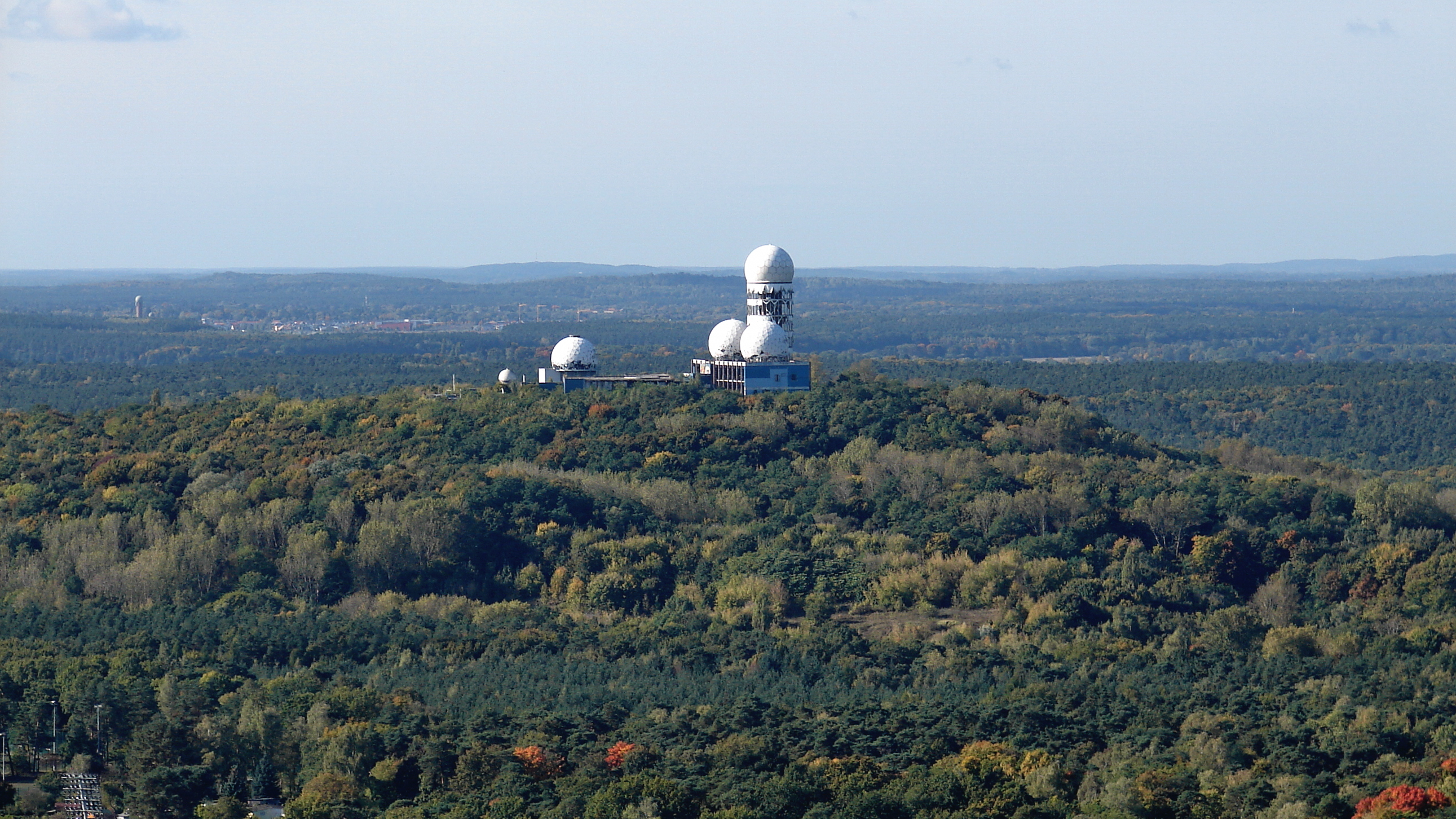 Blick von der Freiluftplattform auf Berlin.